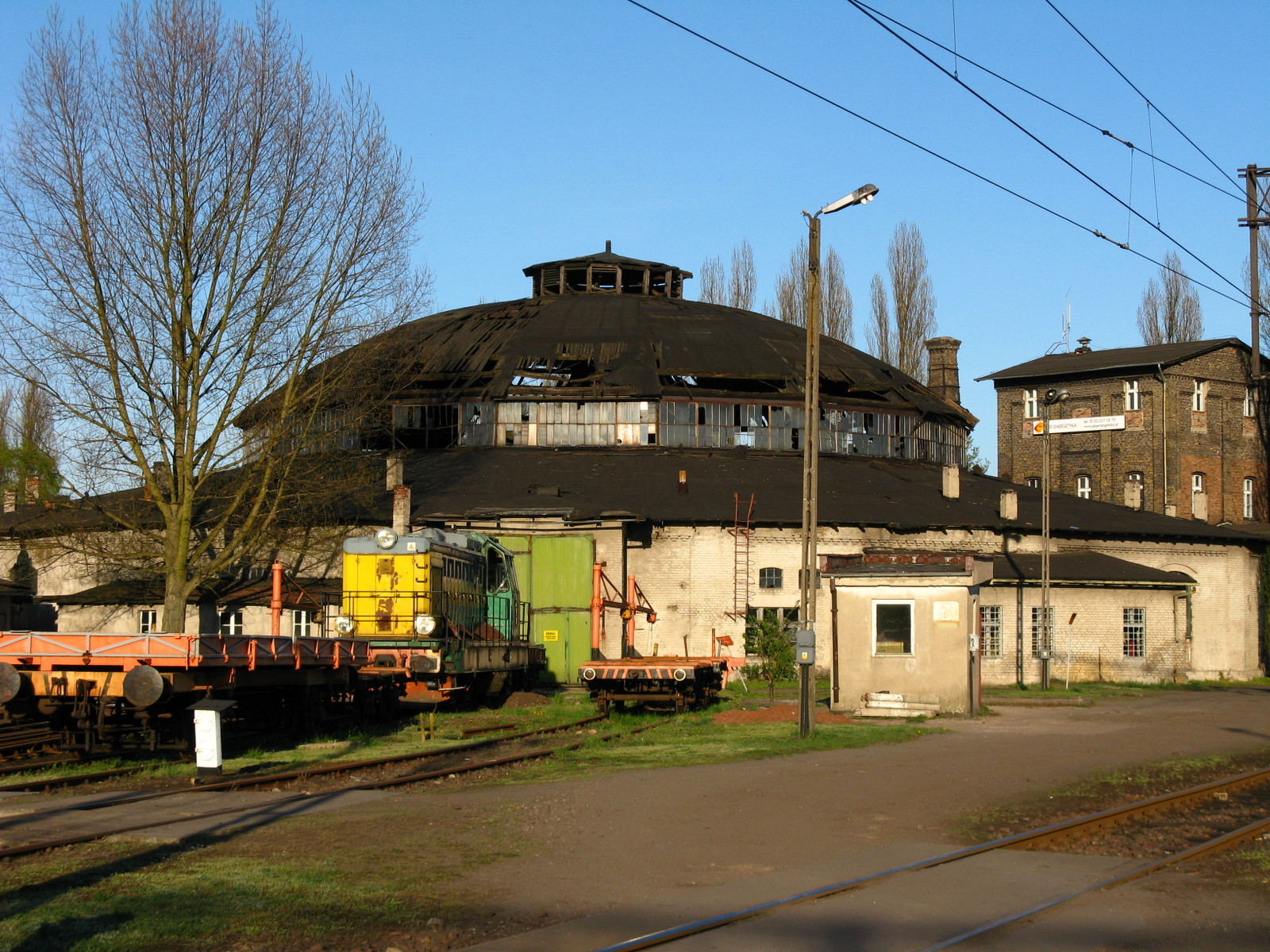 Parowozownia Pilska OKRĄGLAK